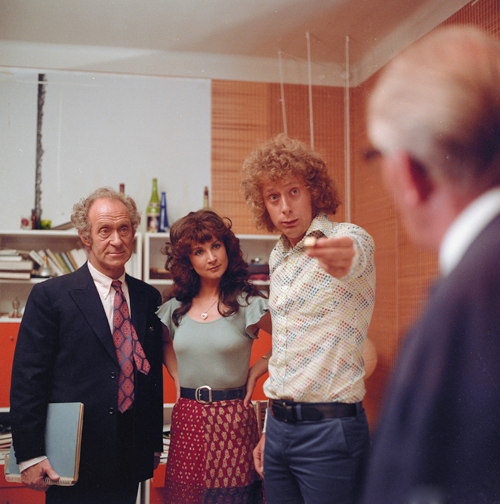 Bob de Lange, Maélys Morel & Hans Otjes in Q & Q